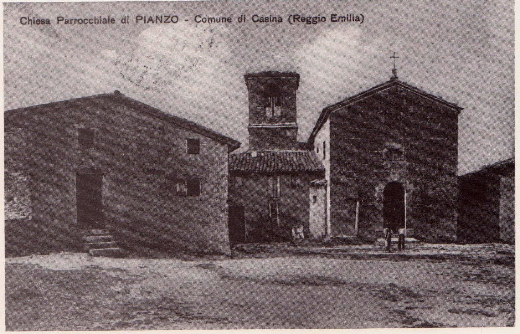 Bromuro d'argento di 12x17 cm su carta 20x27 cm